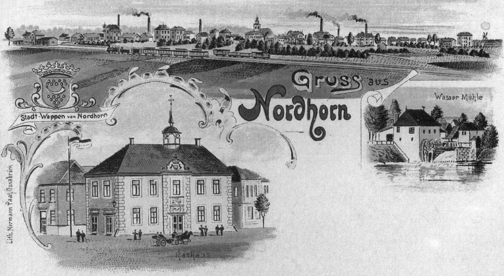 Nordhorn